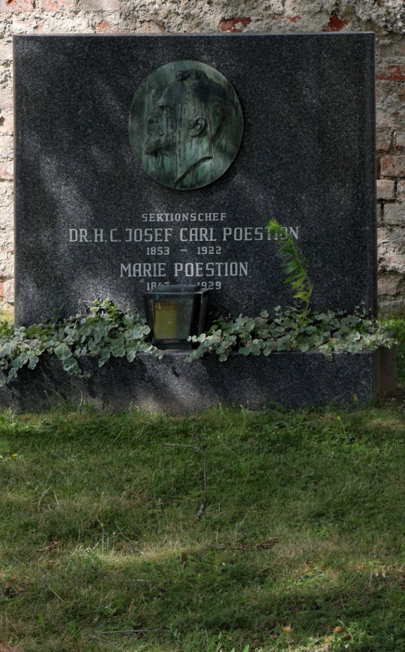 Wiener Zentralfriedhof - Gruppe 0, Ehrengrab von Josef Poestion